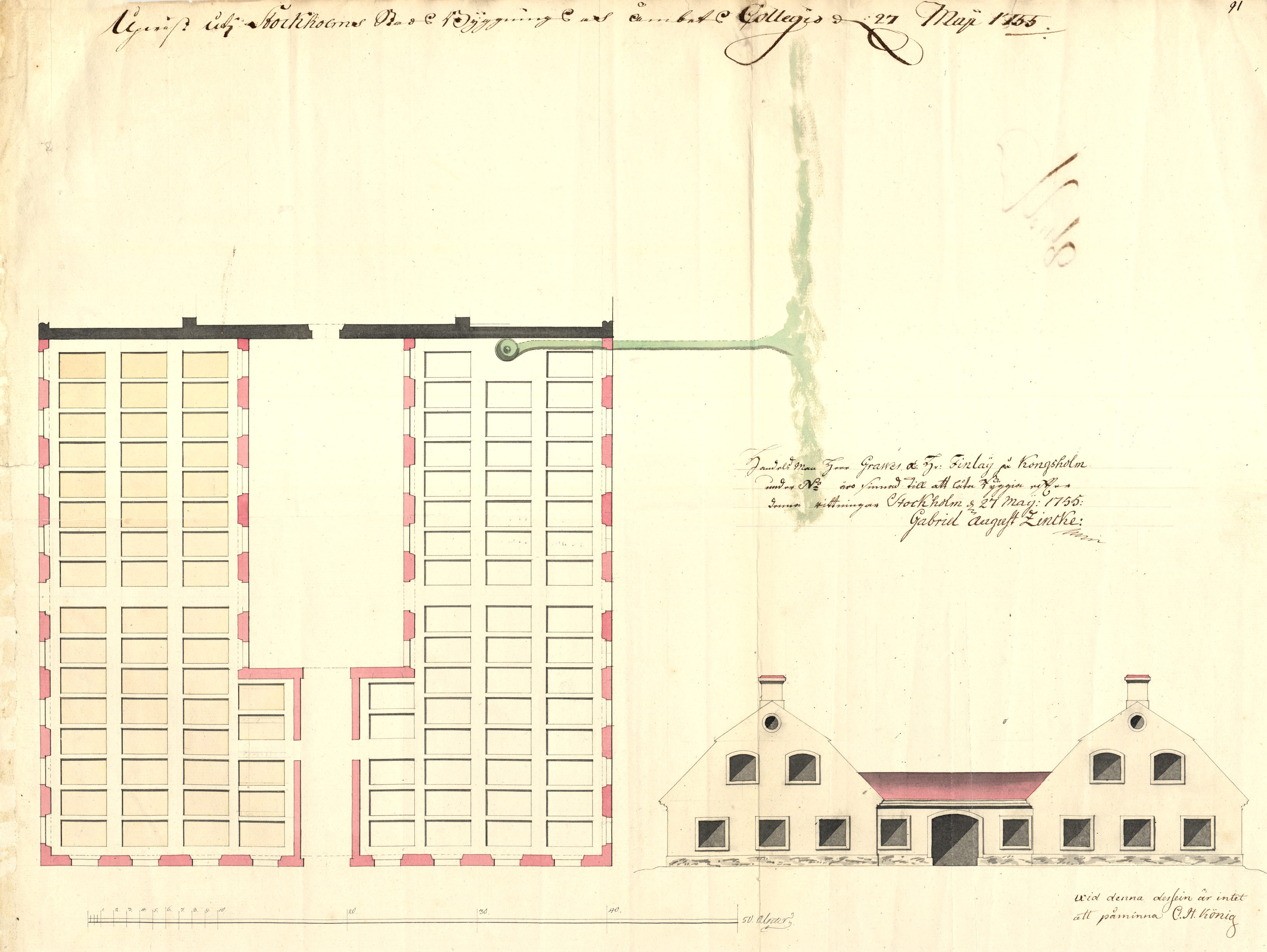 Fabriksbyggnad (garveri) på Kungsholmen för Jacob Graver och Robert Finlay. Ritning av Gabriel August Zincke